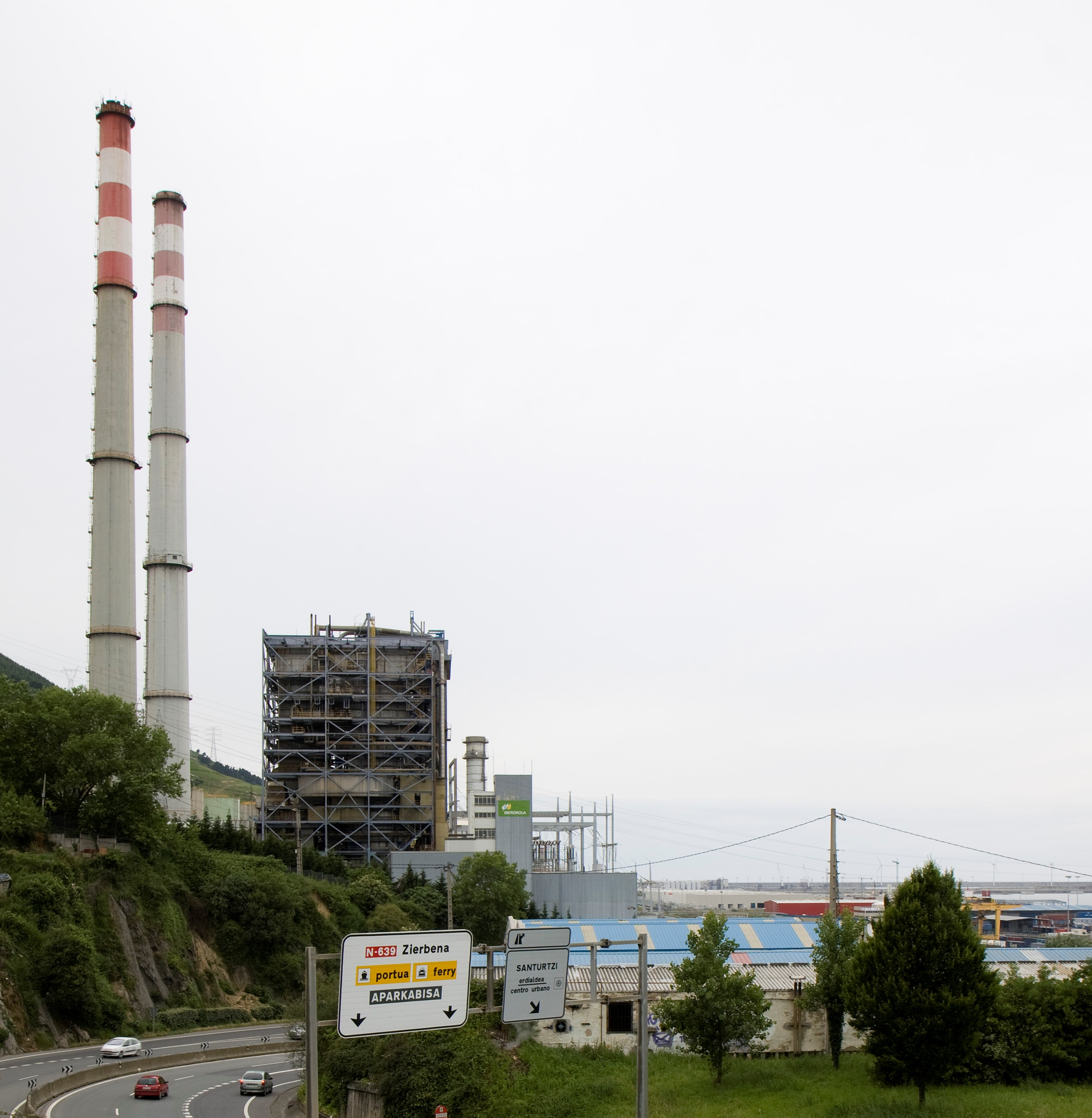 Central térmica de Santurtzi. Consta de dos calderas, la unidad 1(foto) con 377.255 Kw, y la unidad 2 con 541.673 Kw